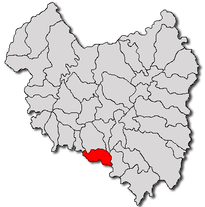 Categorie:Hărţi ale judeţului Covasna